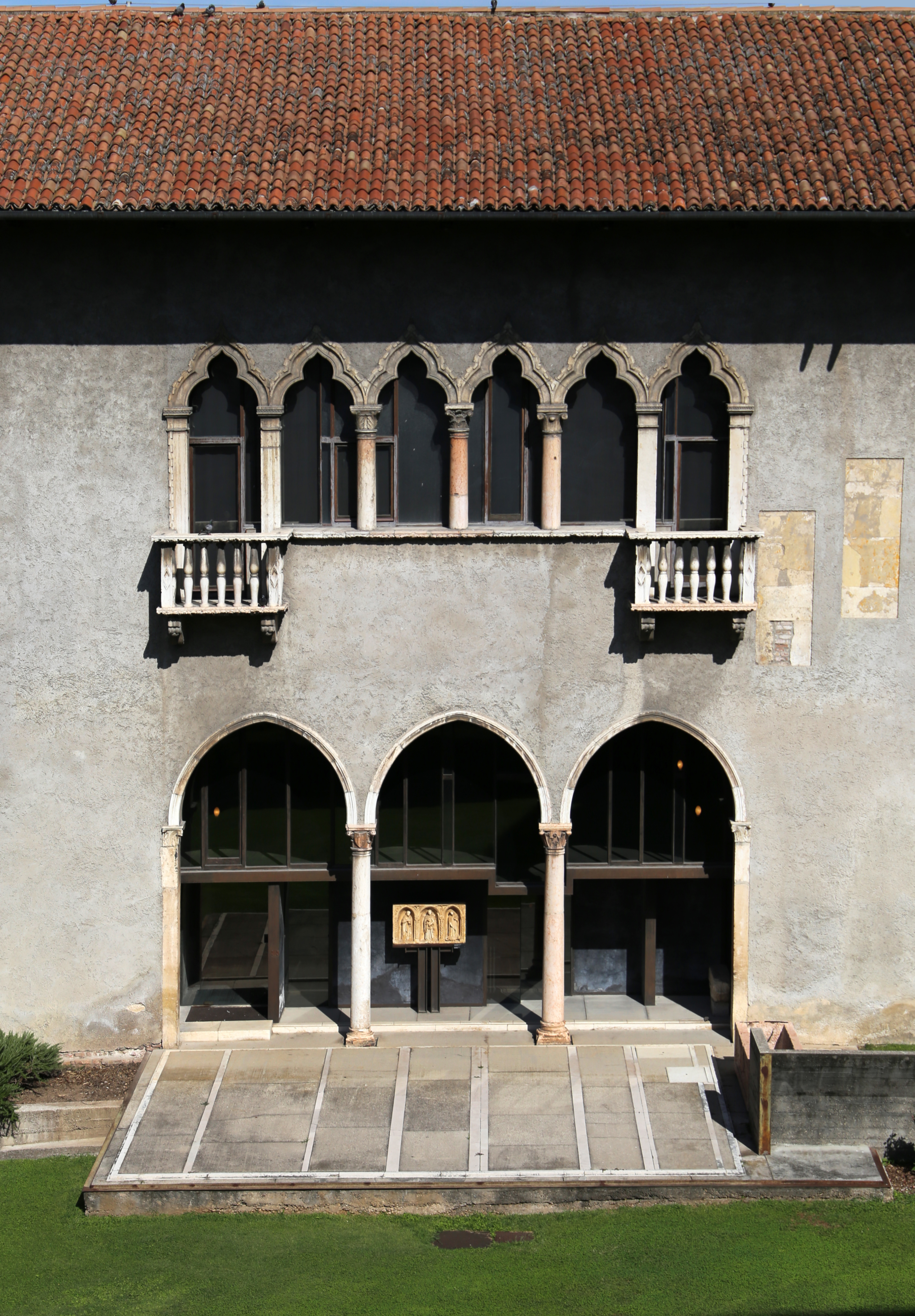 Museo di Castelvecchio This is a photo of a monument which is part of cultural heritage of Italy.